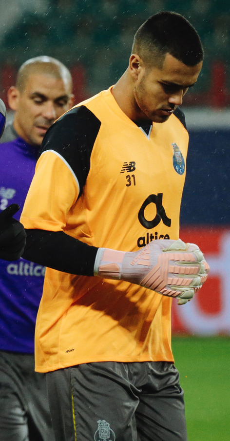 Икер Касильяс вместе с «Порту» готовится к матчу с «Локомотивом»